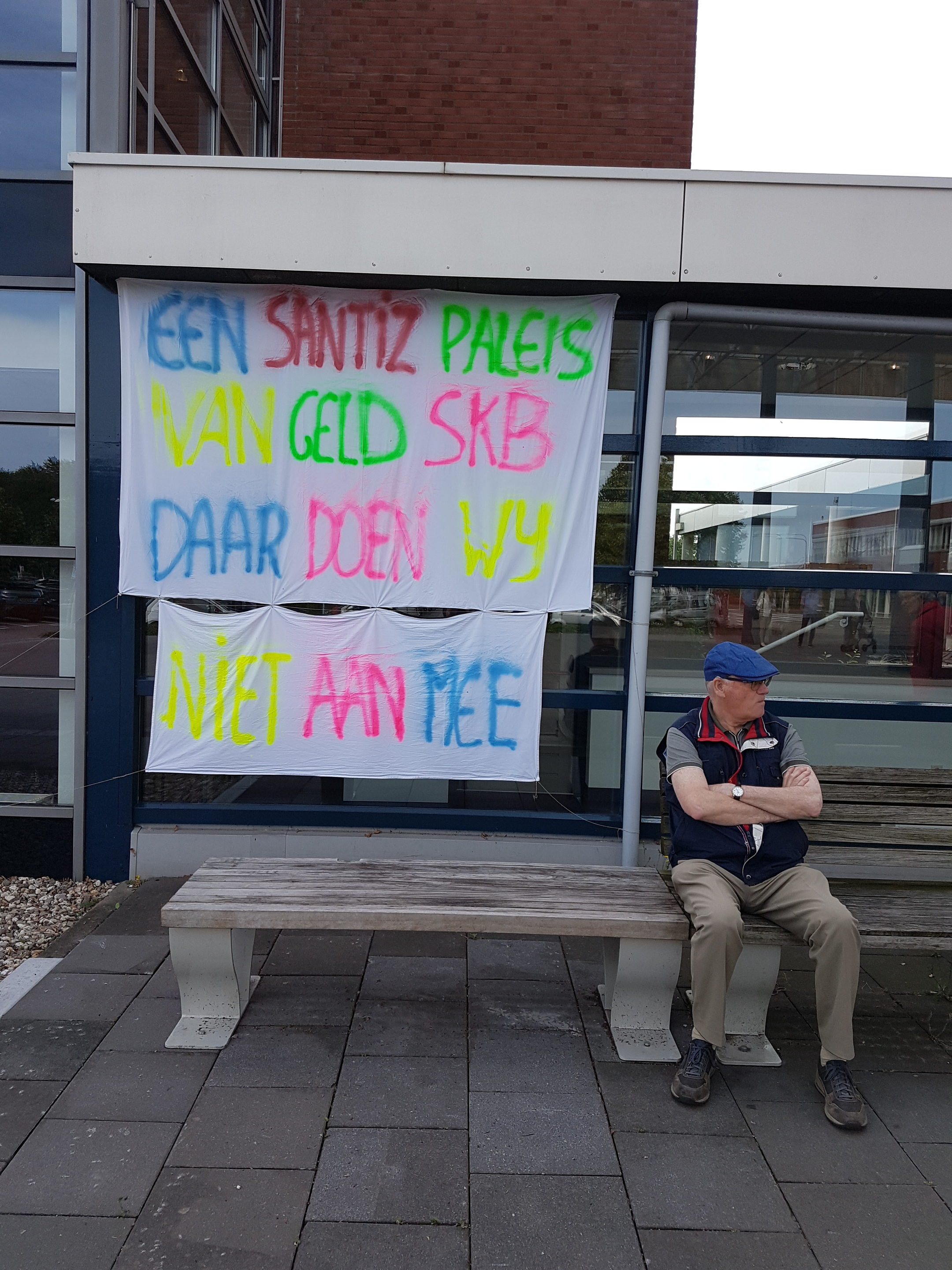 Het personeel van het SKB Winterswijk wil dat de fusie met Santiz Doetinchem wordt teruggedraaid, en protesteert tijdens de COVID-19 pandemie met spandoeken.